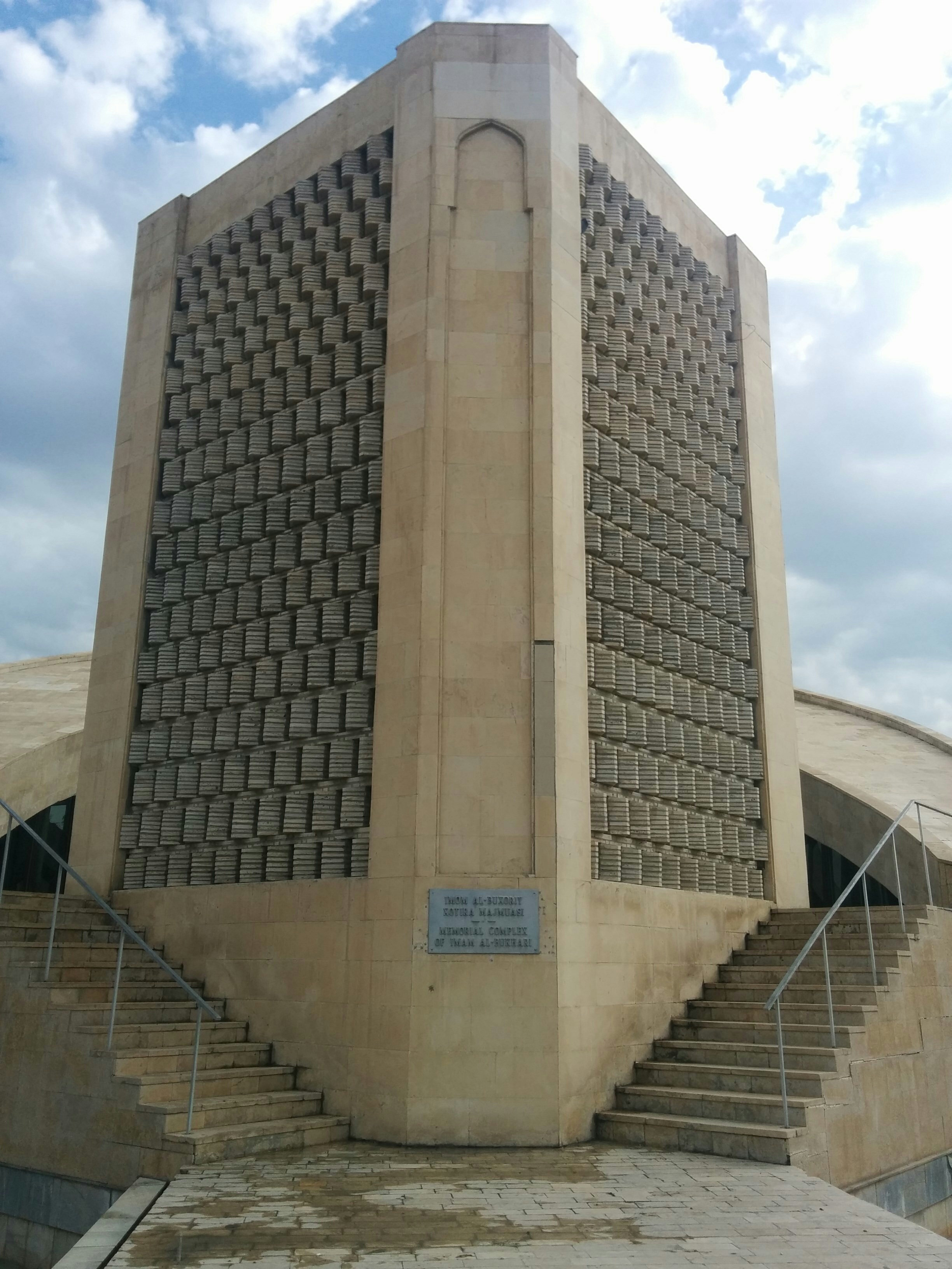 Chashmai Ayyub ro'parasida